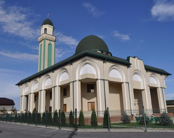 Центральная мечеть города Баксан